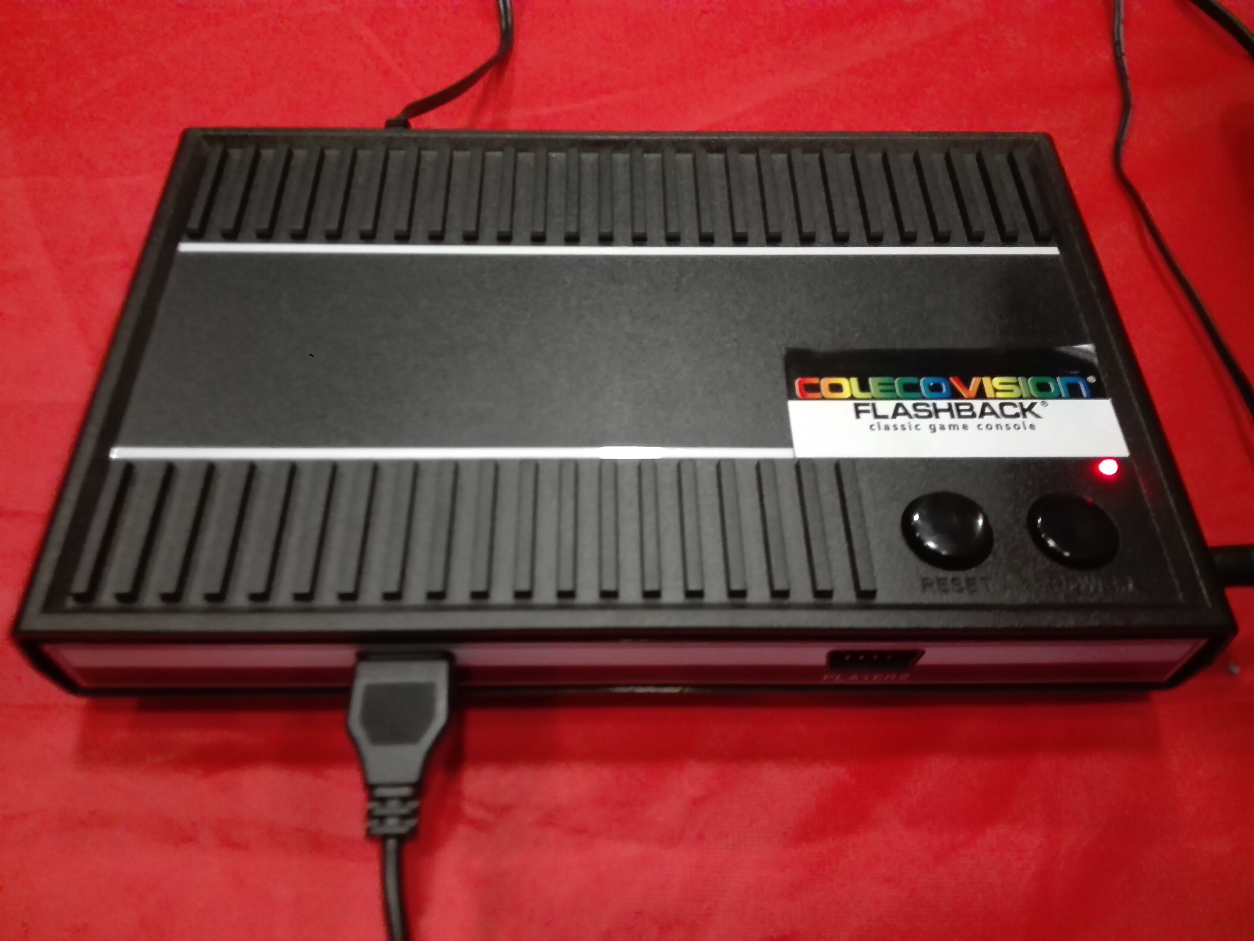 Coleco Vision Flashback